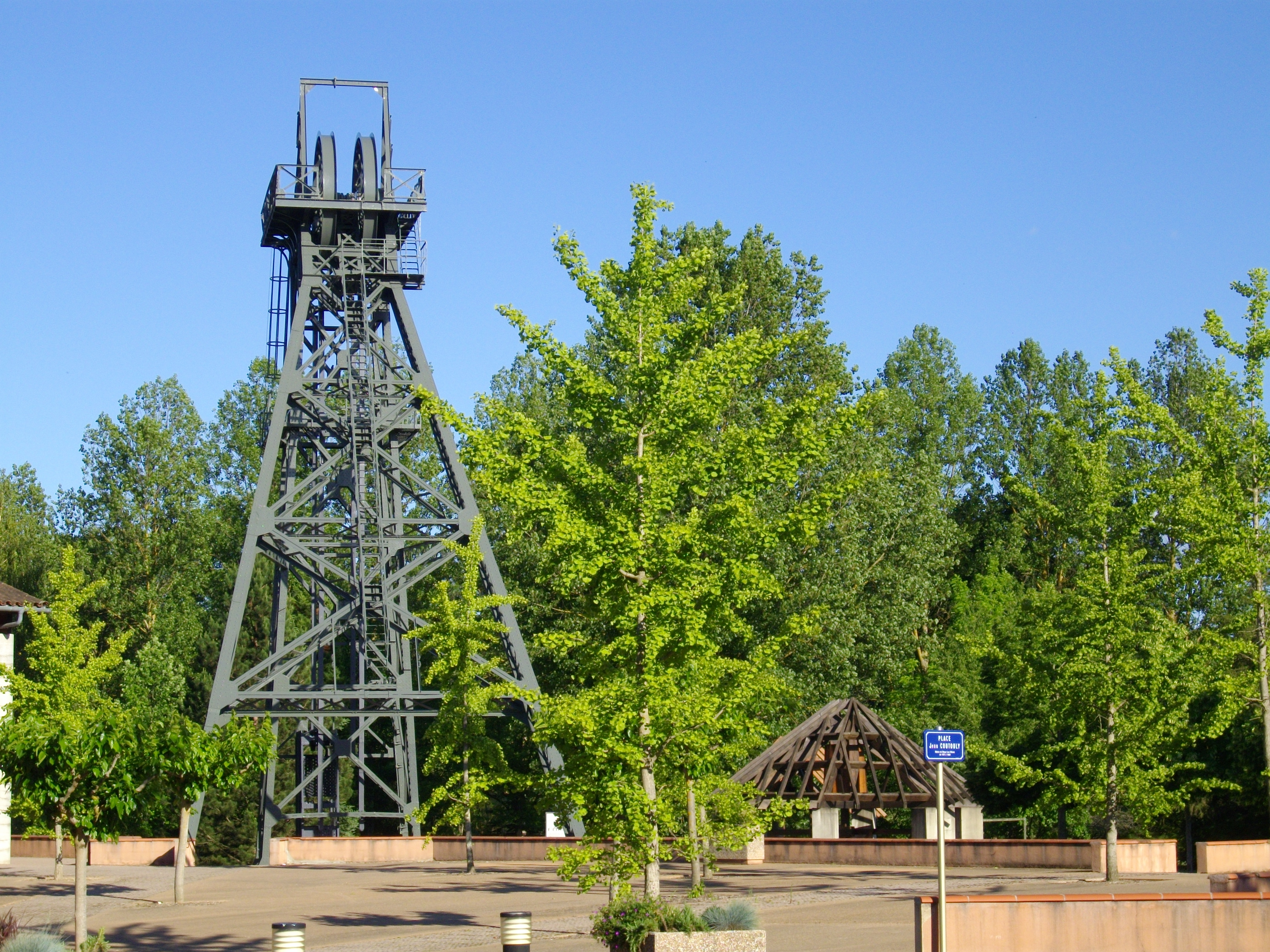 Puits des mines de Carmaux, exposés sur le site de la mairie de Blaye-les-Mines (1988). A gauche, le chevalement du puits de Sainte-Marie (1922) A droite, on aperçoit la reconstitution (1989) d'un puits de mine et d'une machine à molette de 1789.